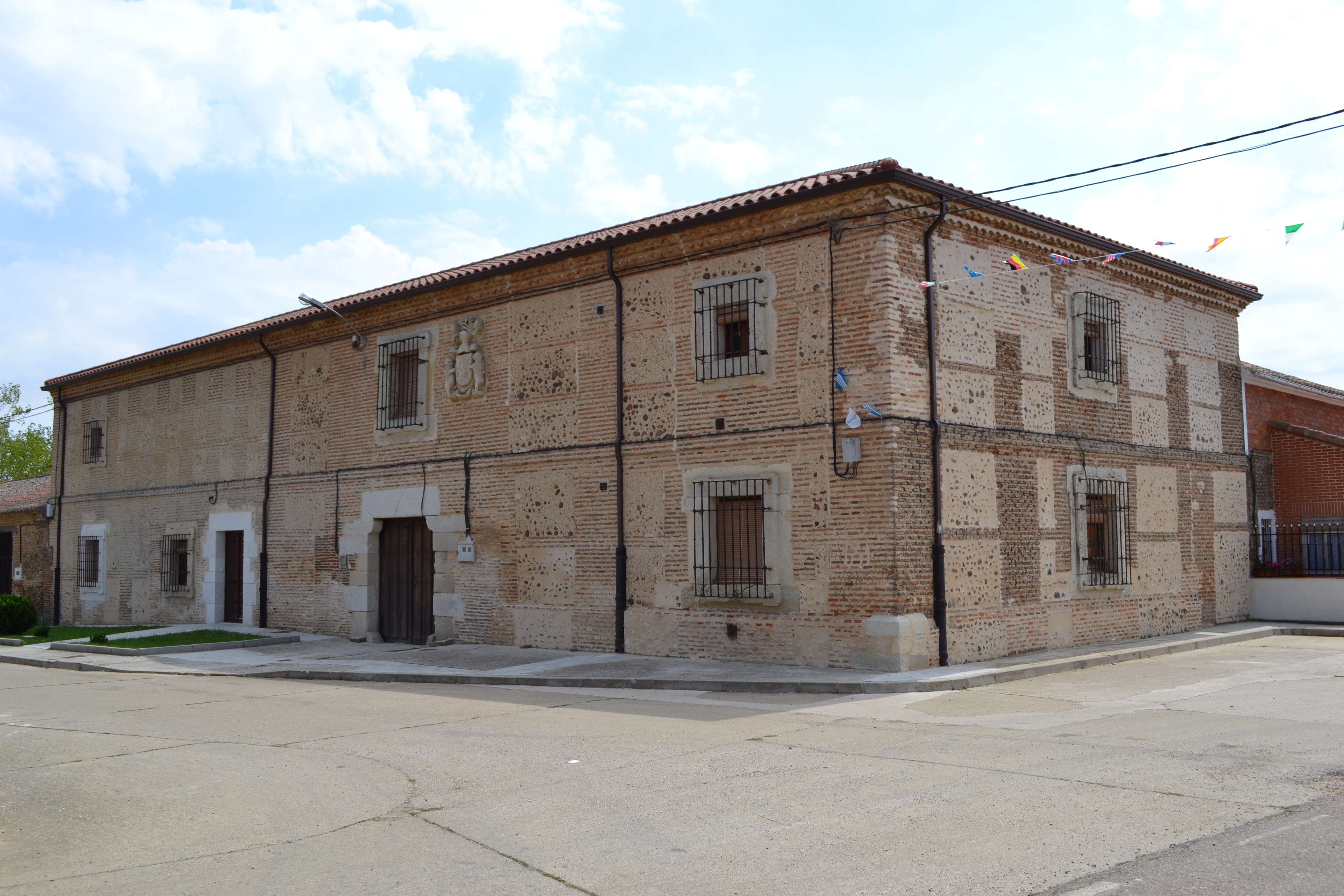 Casa de Leon